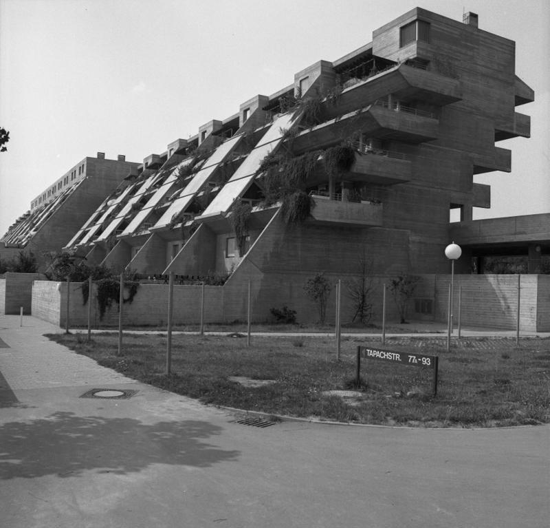 Stuttgart Demonstrativbauvorhaben, Hügelhaus an der Tapachstraße